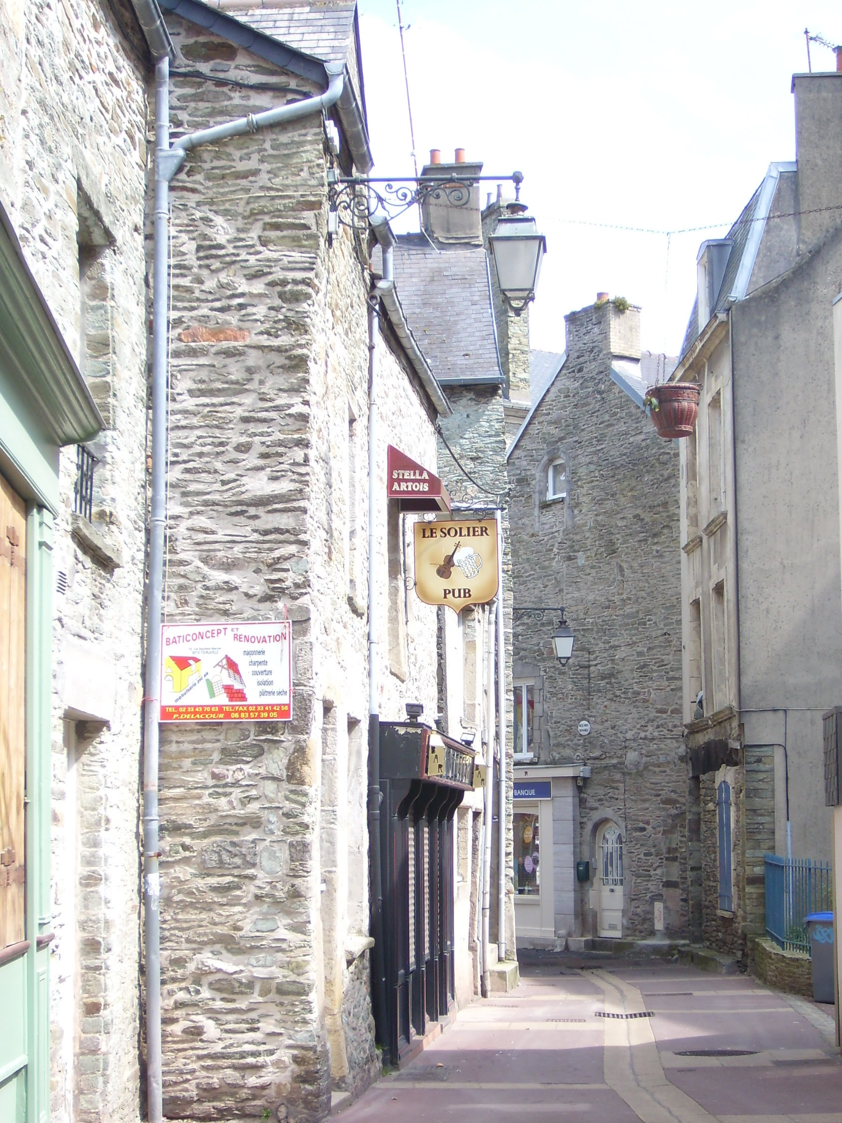 Rue des Fossés, Cherbourg. Première percée au XVIe siècle, devenue rue des Chapons-sur-les-fossés au XVIIe, puis rue des fossés